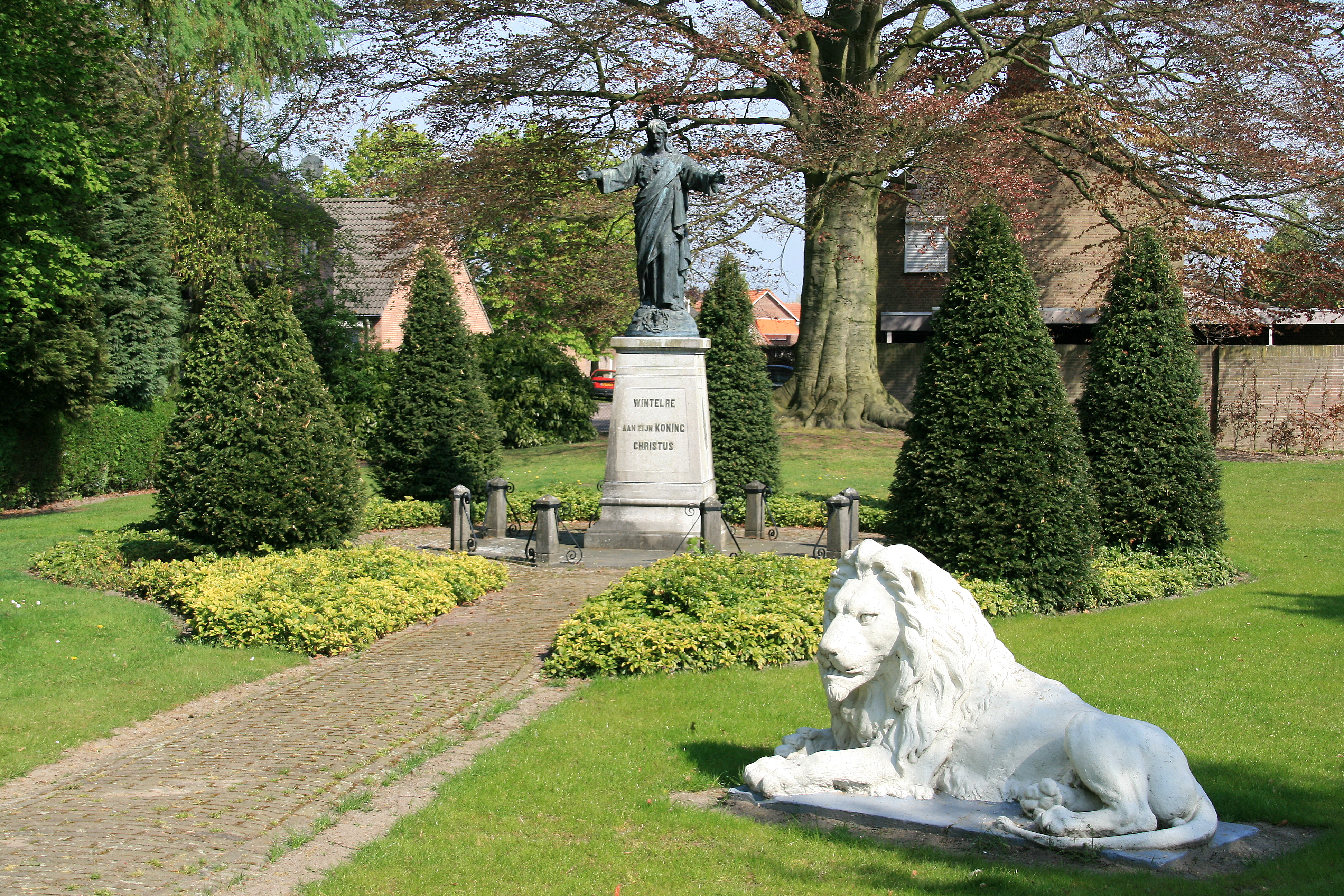 Wintelre - Willibrordusstraat bij 37 - Heilig Hartbeeld